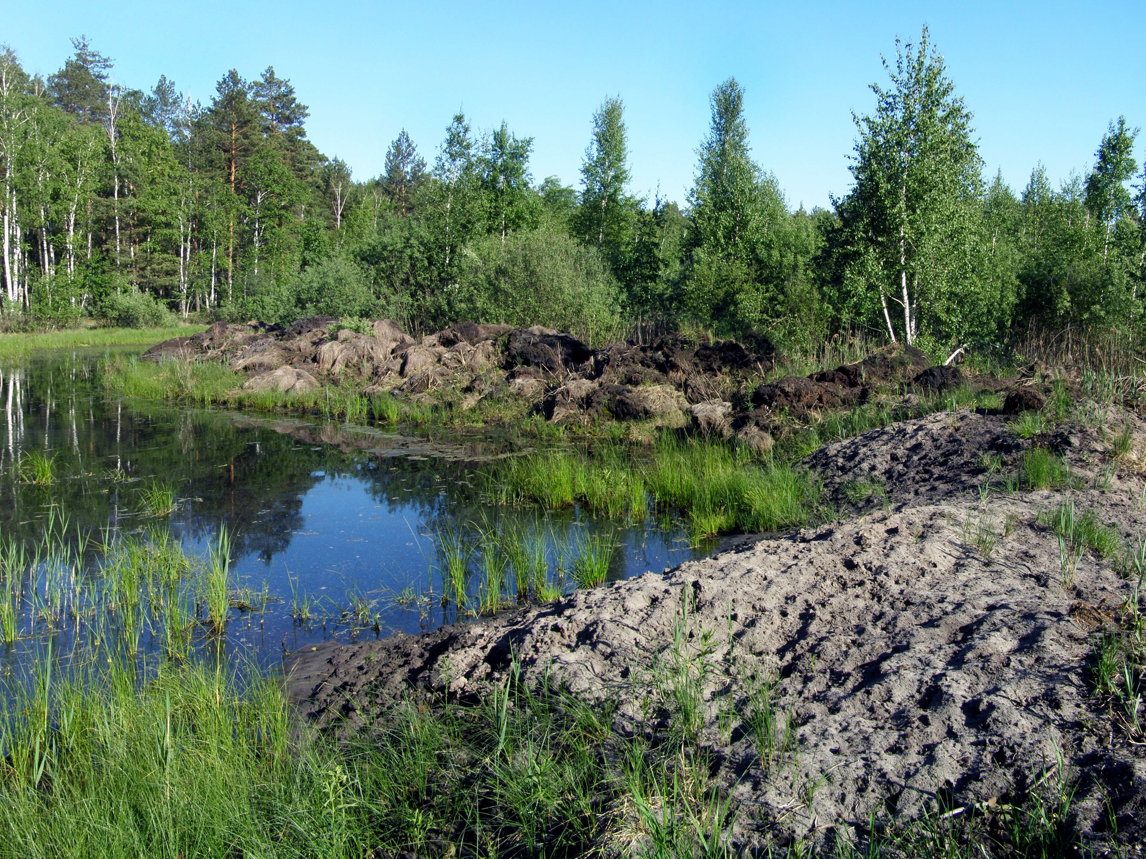 Волосне, Коростенський р-н, ДП «Коростенське ЛМГ», Ушомирське лісництво, кв. 36, вид. 16, 17, 23, 30